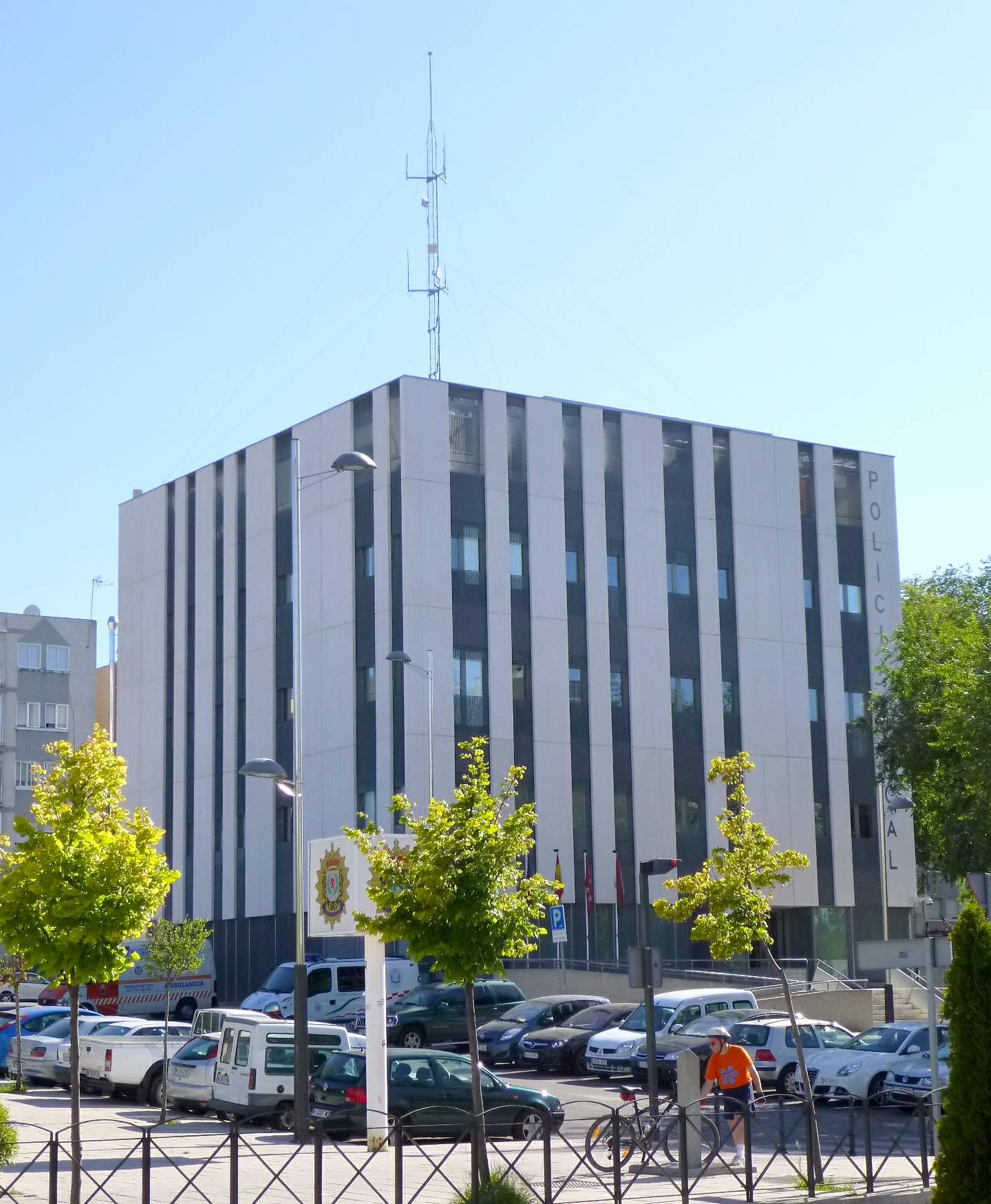 Policía Municipal de Coslada, en la Comunidad de Madrid. Desde aquí ejercía su turbio imperio particular Ginés Jiménez, el célebre "sheriff de Coslada", de ominosa fama.